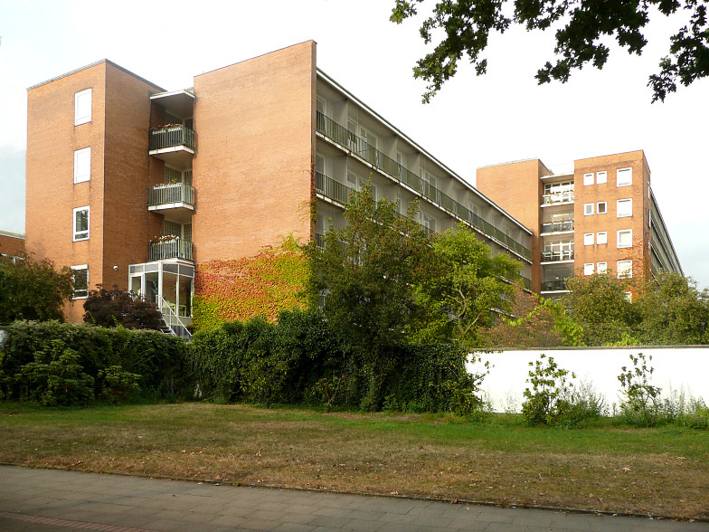 Oststadtkrankenhaus